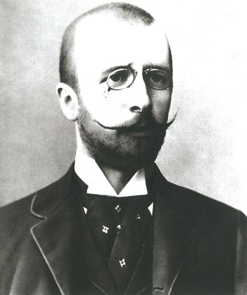 Stjepan Miletić (1868-1908).